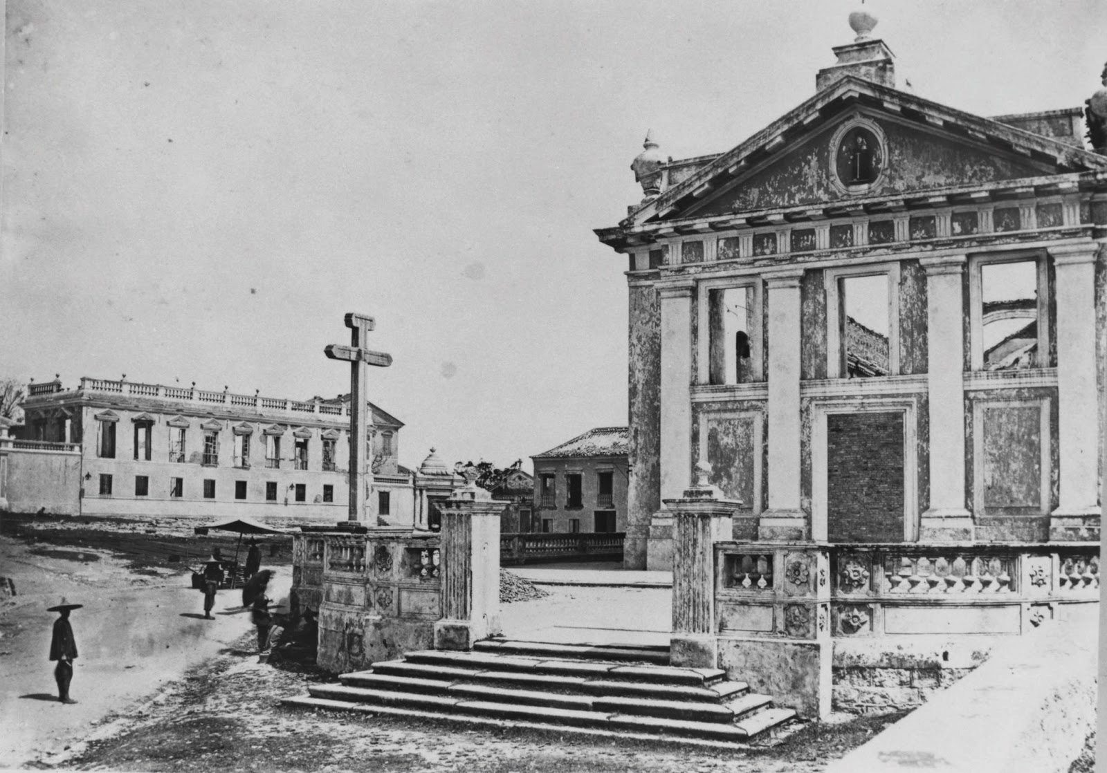 Auf dem Bild erkennt man die nach einem Taifun von 1874 stark zerstörte Igreja de Santo António im portugiesischen Macau. Das Bild muss zwischen 1874 und 1875 entstanden sein, da die Kirche 1875 bereit wiederaufgebaut wurde.